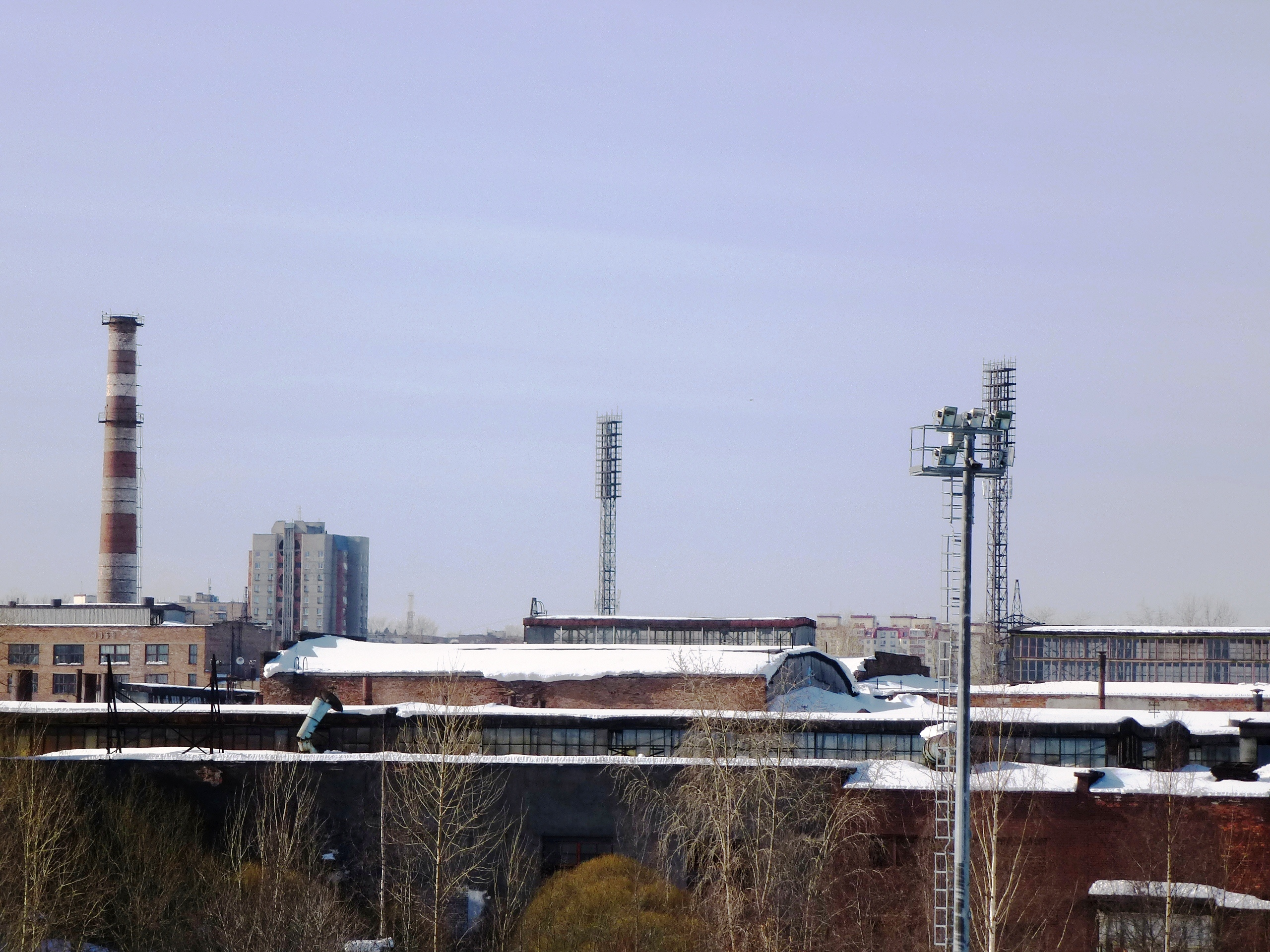 Корпуса цехов Онежского тракторного завода в центре Петрозаводска (вид с проспекта Карла Маркса). Снесены в 2015-2016 годах.